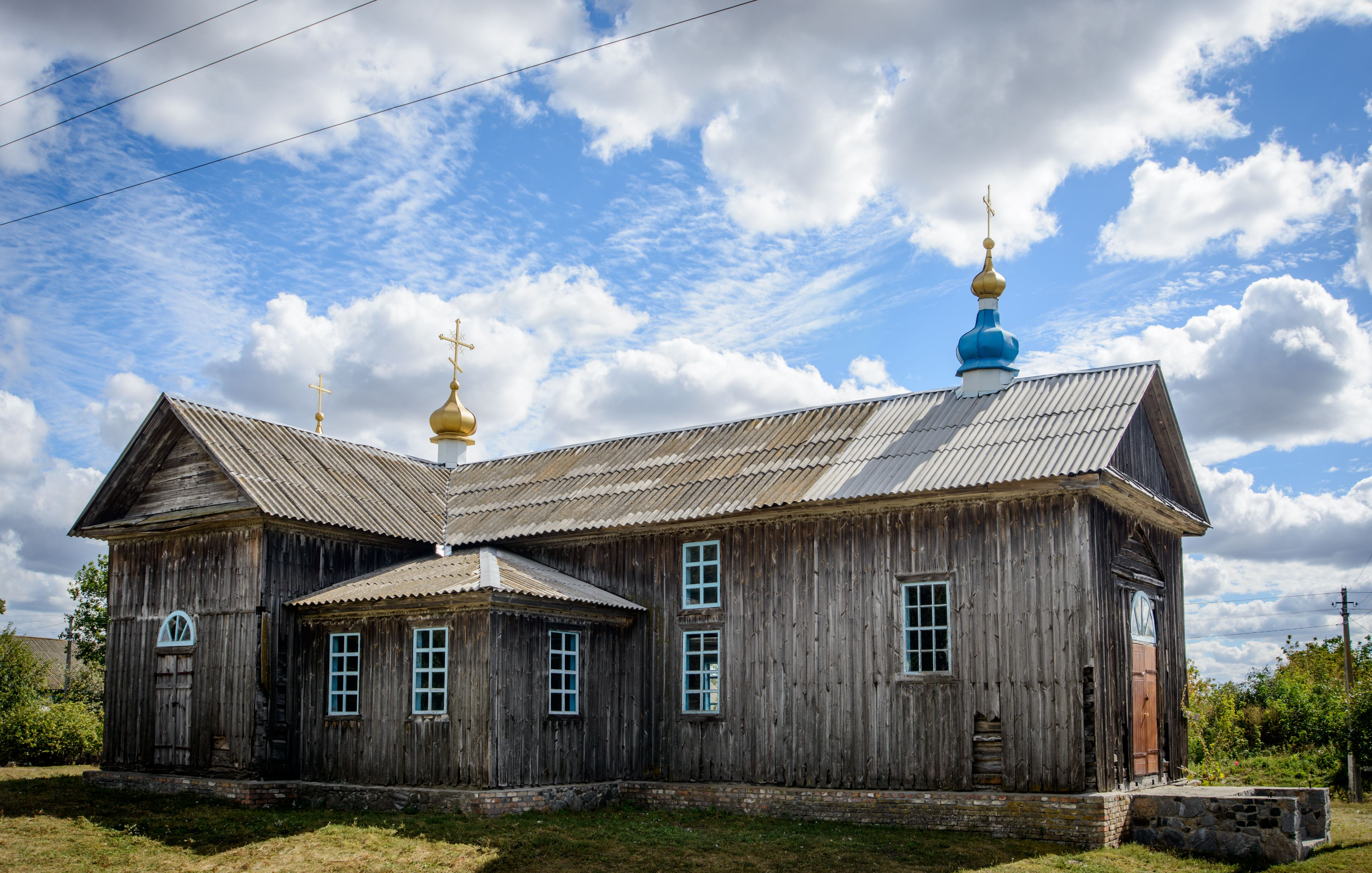 Церква Успіння Пресвятої Богородиці (Успенська церква) в селі Вечі́рки в Пирятинському районі Полтавської області Знято під час Вело-вікі-експедиція селами Гребінківського та Пирятинського районів